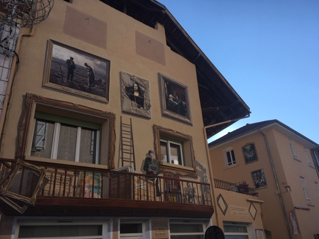 Vue en perspective des deux murs de la fresque en trompe l'œil. Fresque située au n°3 et n°5 bis route Saint Marcellin à Saint-Etienne-de Saint-Geoirs (France)